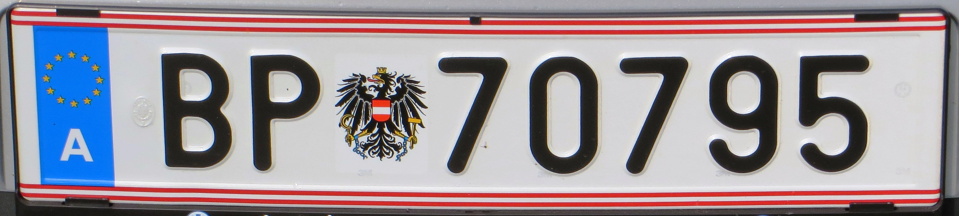 Politie kentekenplaat Oostenrijk